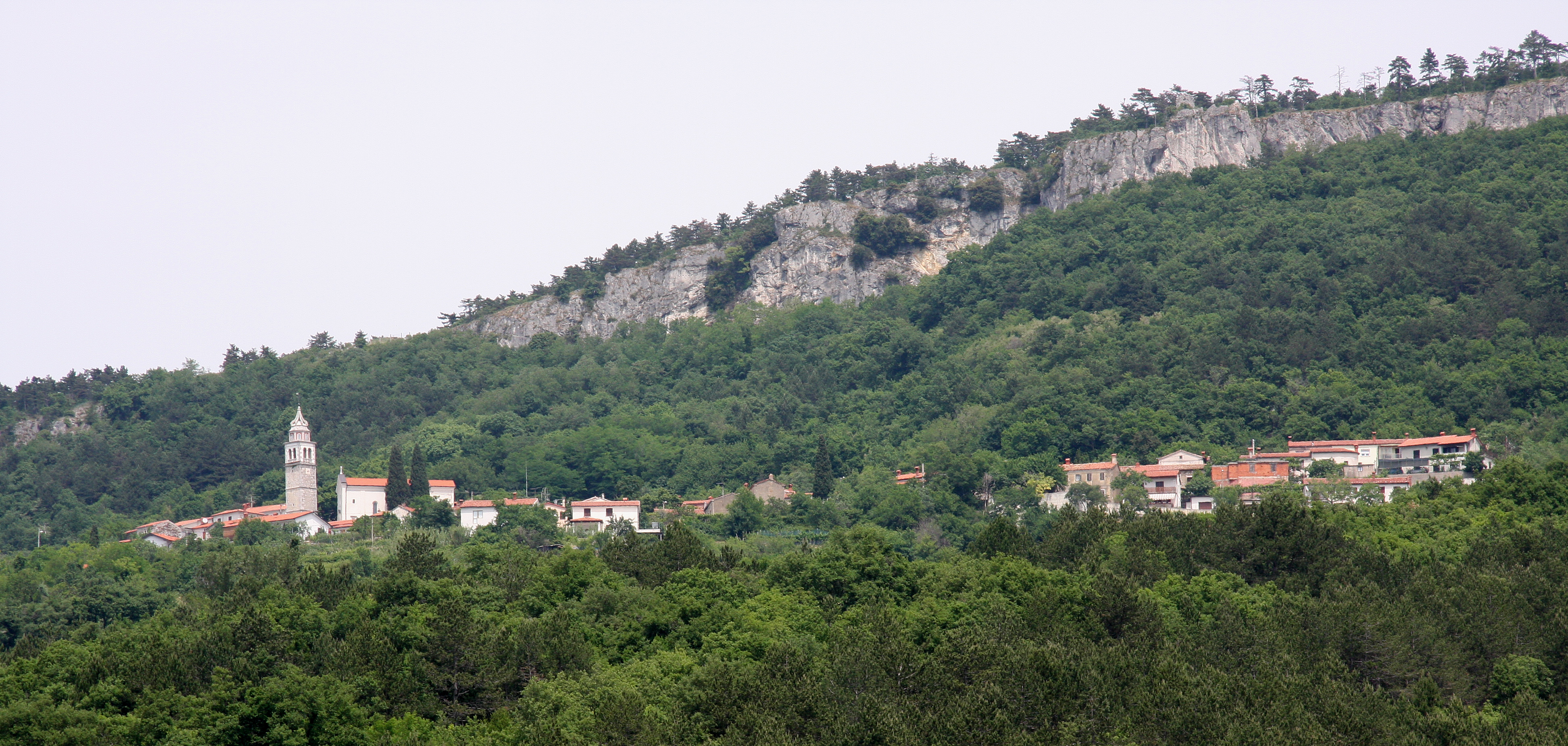 Črni Kal, Slovenia